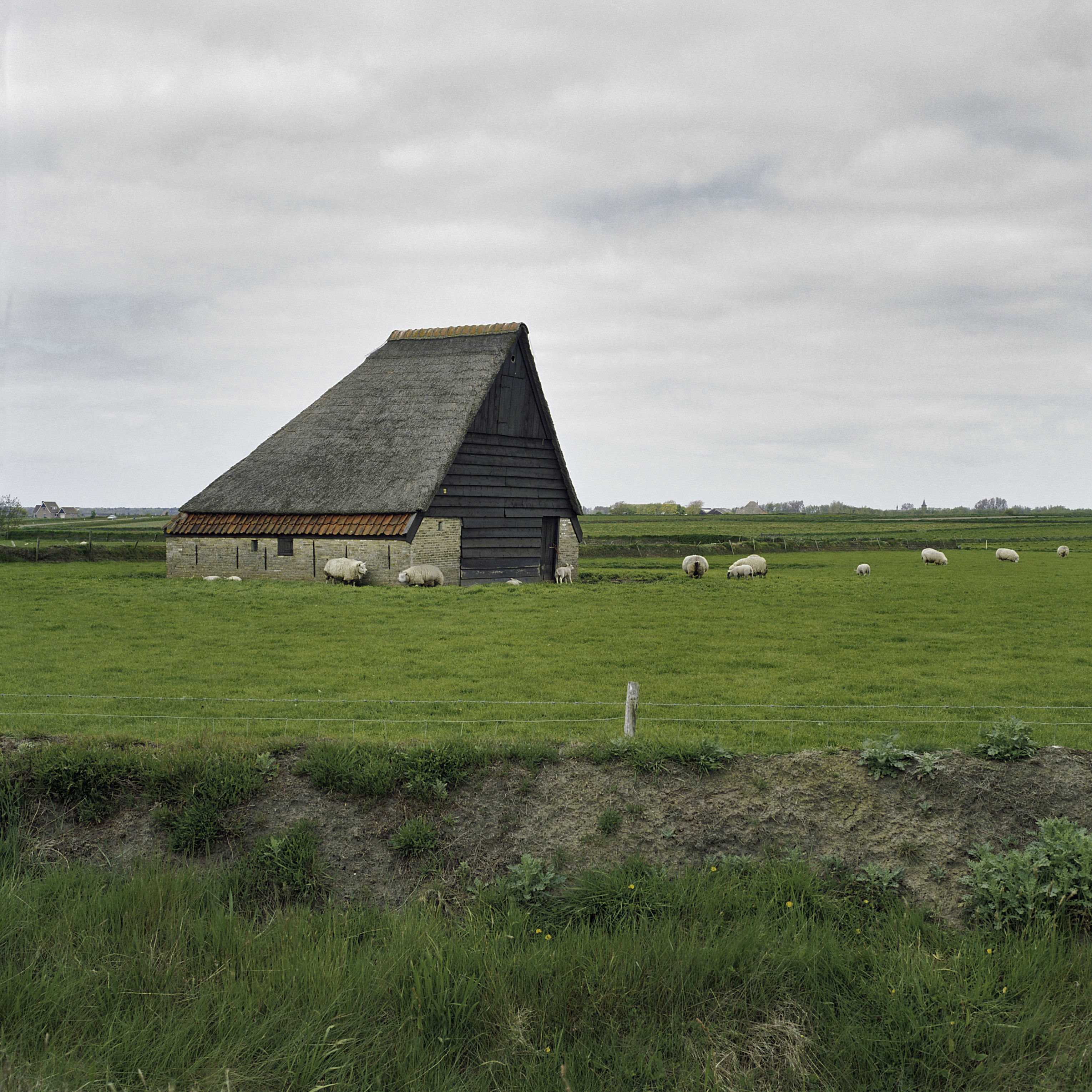 Schaapskooi: Overzicht schapenboet met op de voorgrond plaggendijk (opmerking: Gefotografeerd voor Monumenten In Nederland Noord-Holland)